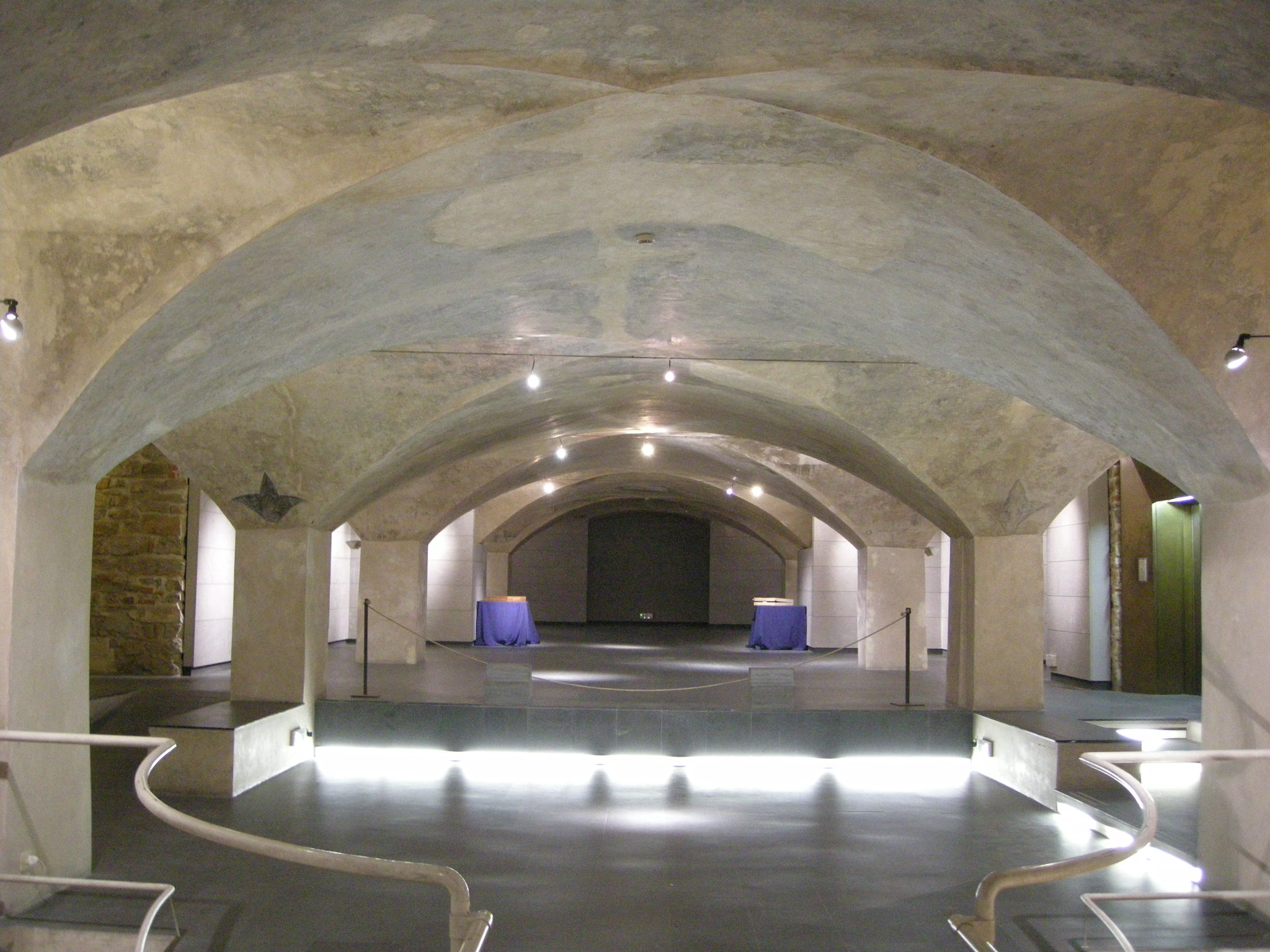 Ex-chiesa di san pancrazio, cripta